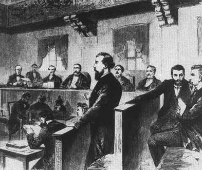 Im Leipziger Hochverratsprozess werden die Sozialdemokraten August Bebel (erster von rechts) und Wilhelm Liebknecht (Mitte stehend) wegen ihrer Opposition gegen den Deutsch-Französischen Krieg verurteilt: 26. März 1872.